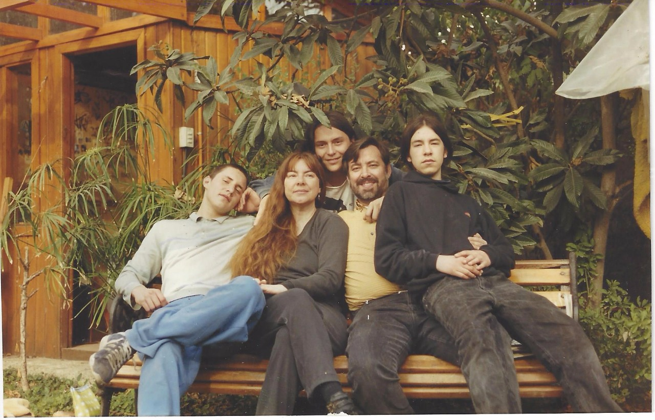 Foto del periodista y político Alejandro Guillier junto a su familia